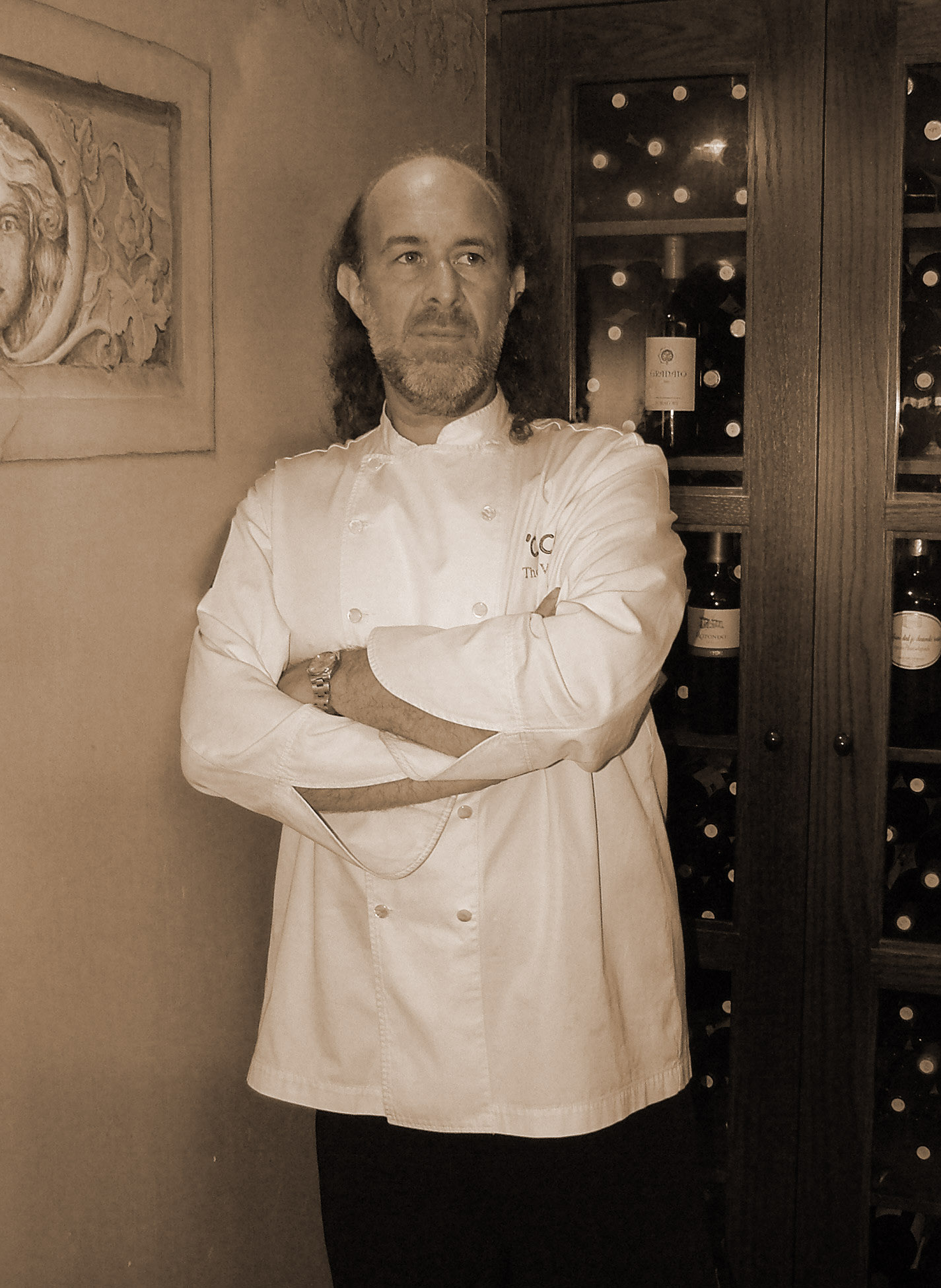 Chef Tom Valenti of Ouest Restaurant [1]